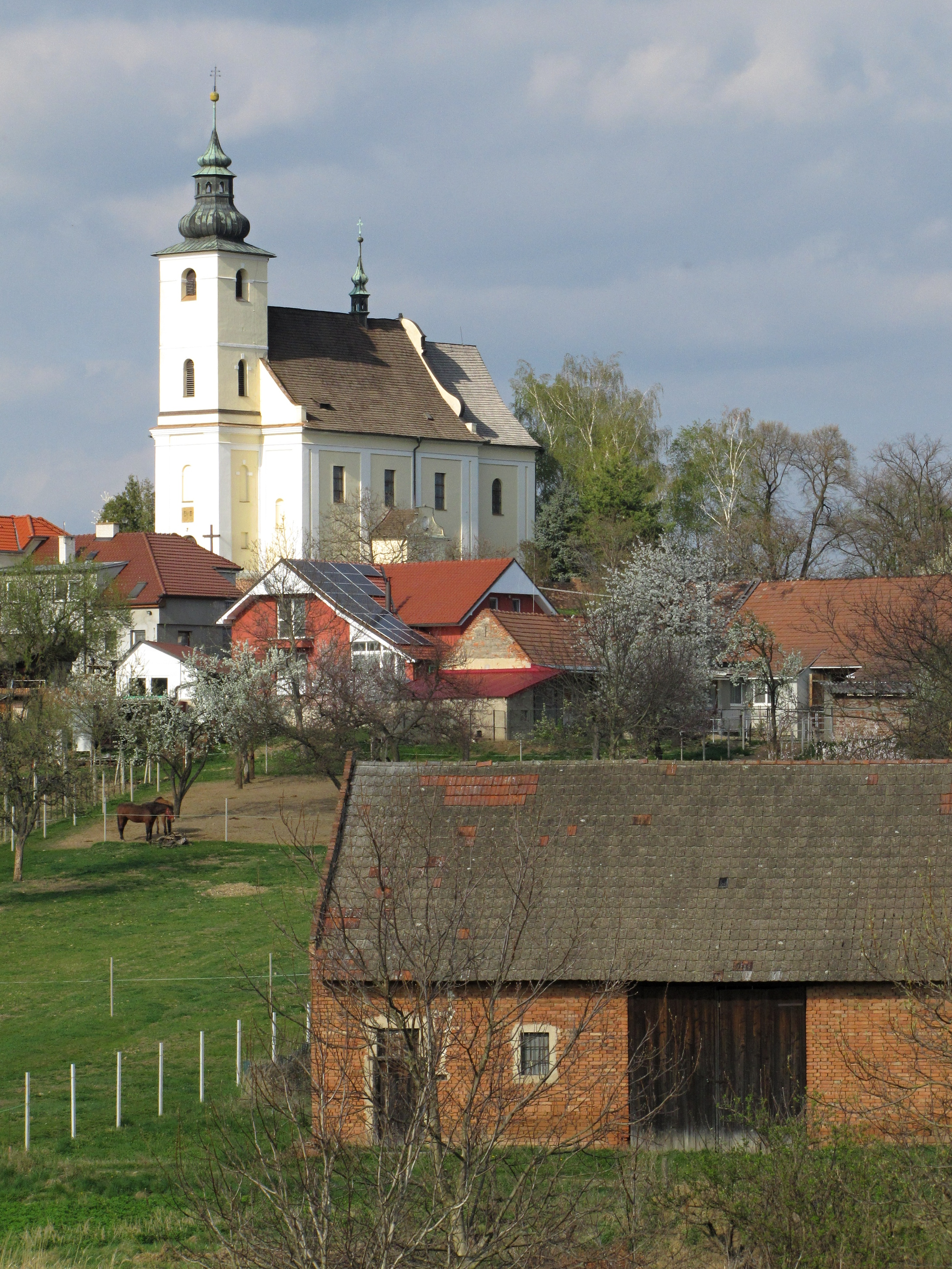 Kostel svatého Jakuba Většího v Ježově, okres Hodonín